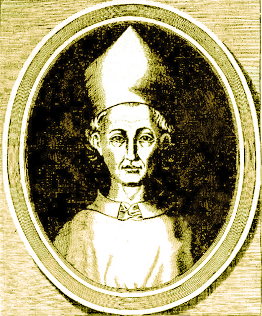 Cardinal Arnaud de Via